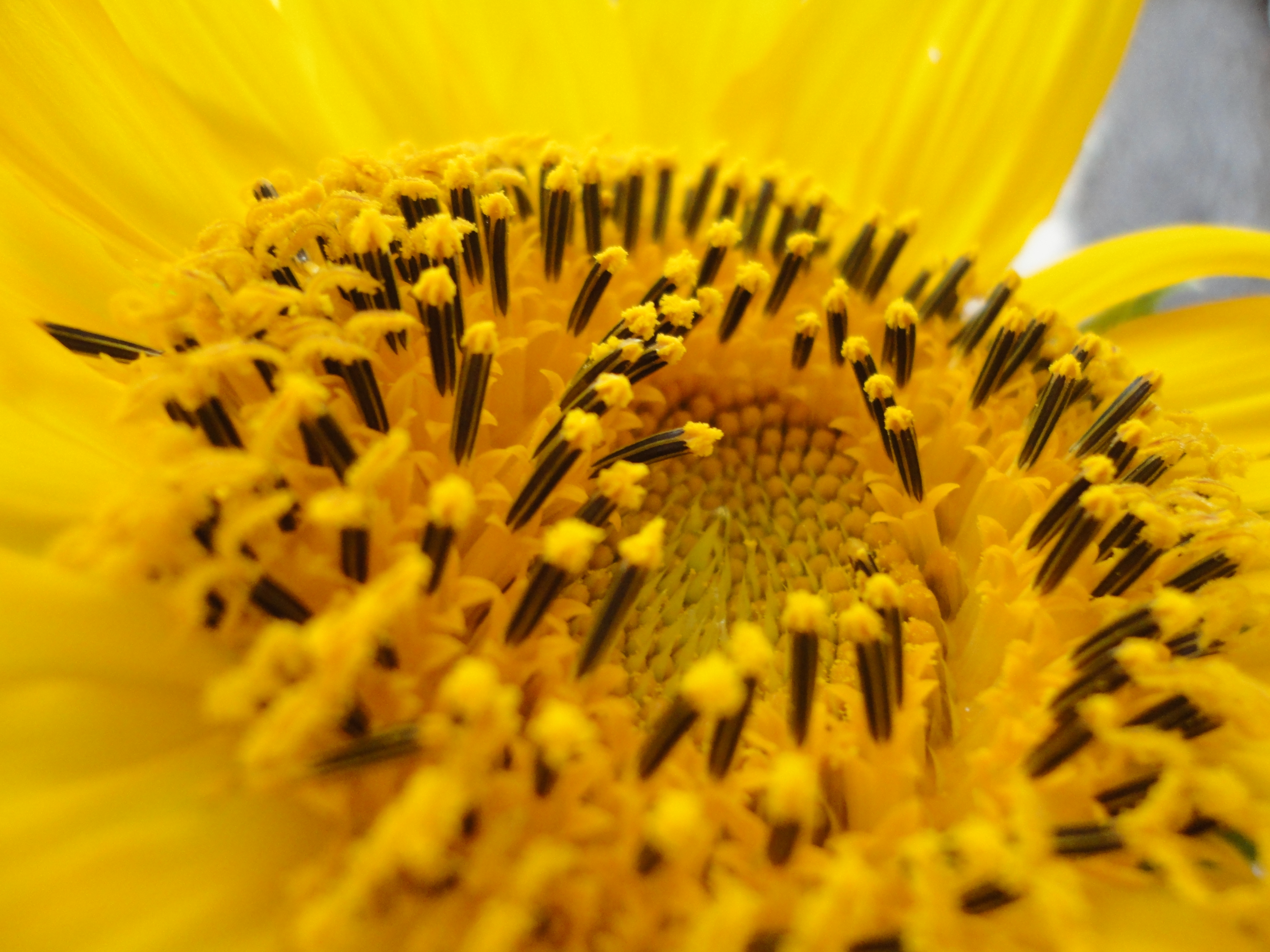 گل آفتابگردانی که هنوز خیلی رشد نکرده و اوایل بزرگشدن او است.